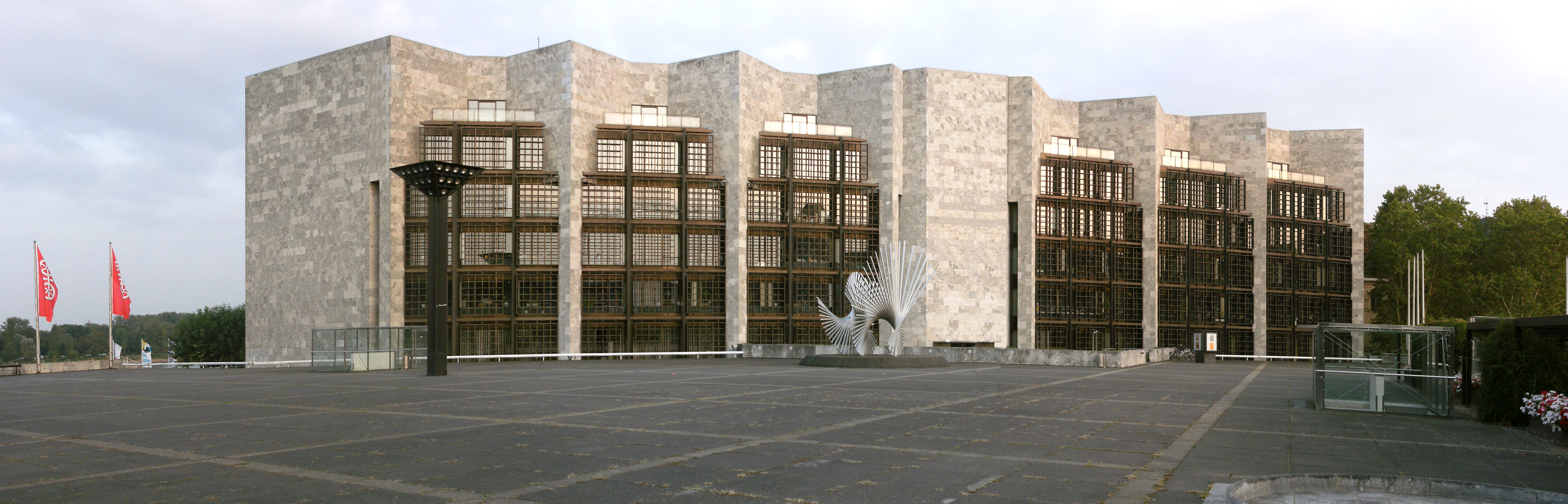 Mainzer Rathaus und der Jockel-Fuchs-Platz davor.